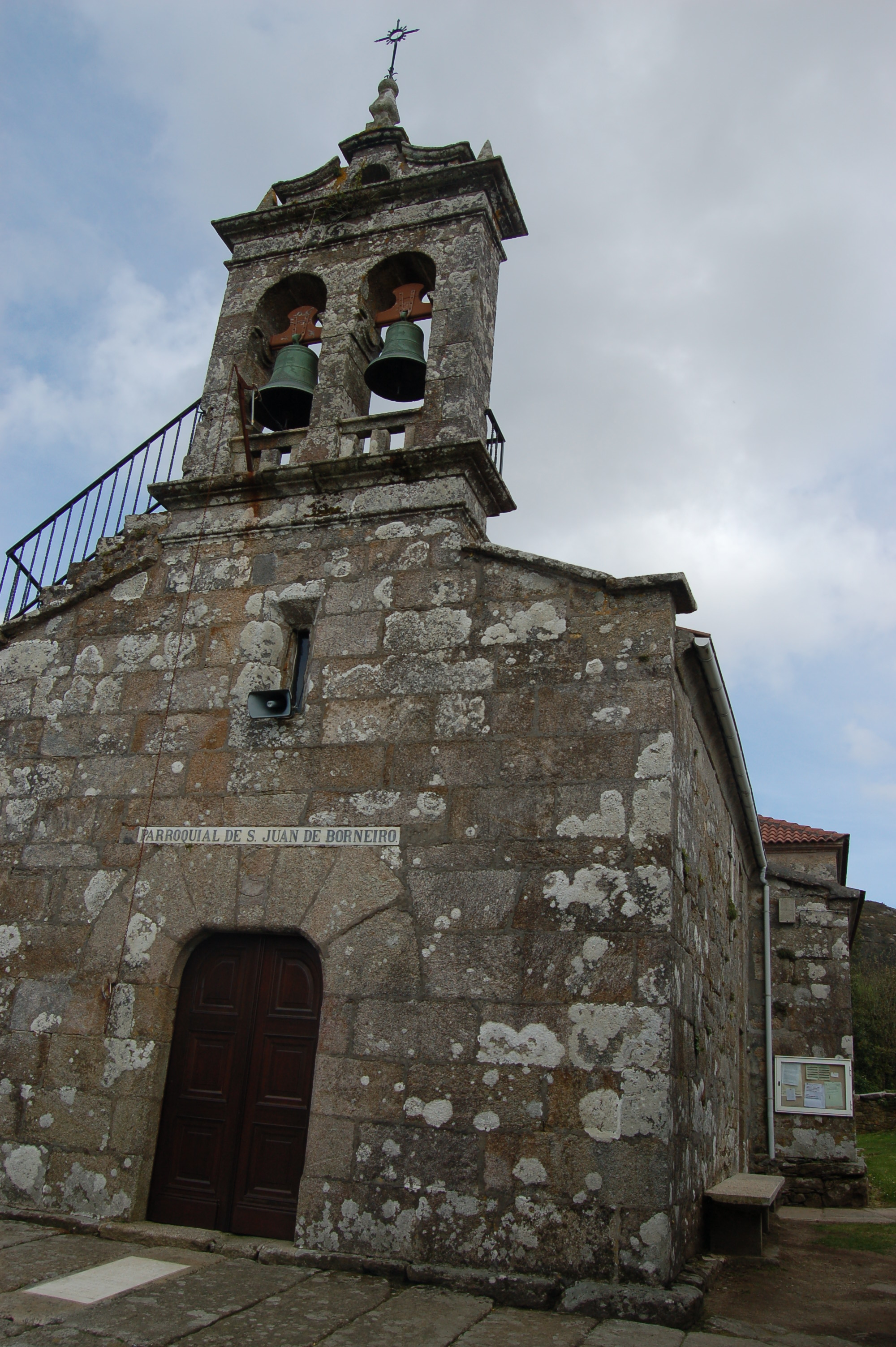 Igrexa parroquial de Borneiro (Cabana de Bergantiños).